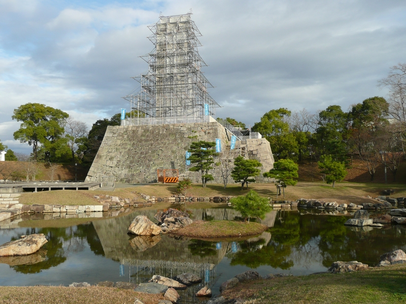 赤穂城跡・天守閣イルミネーション